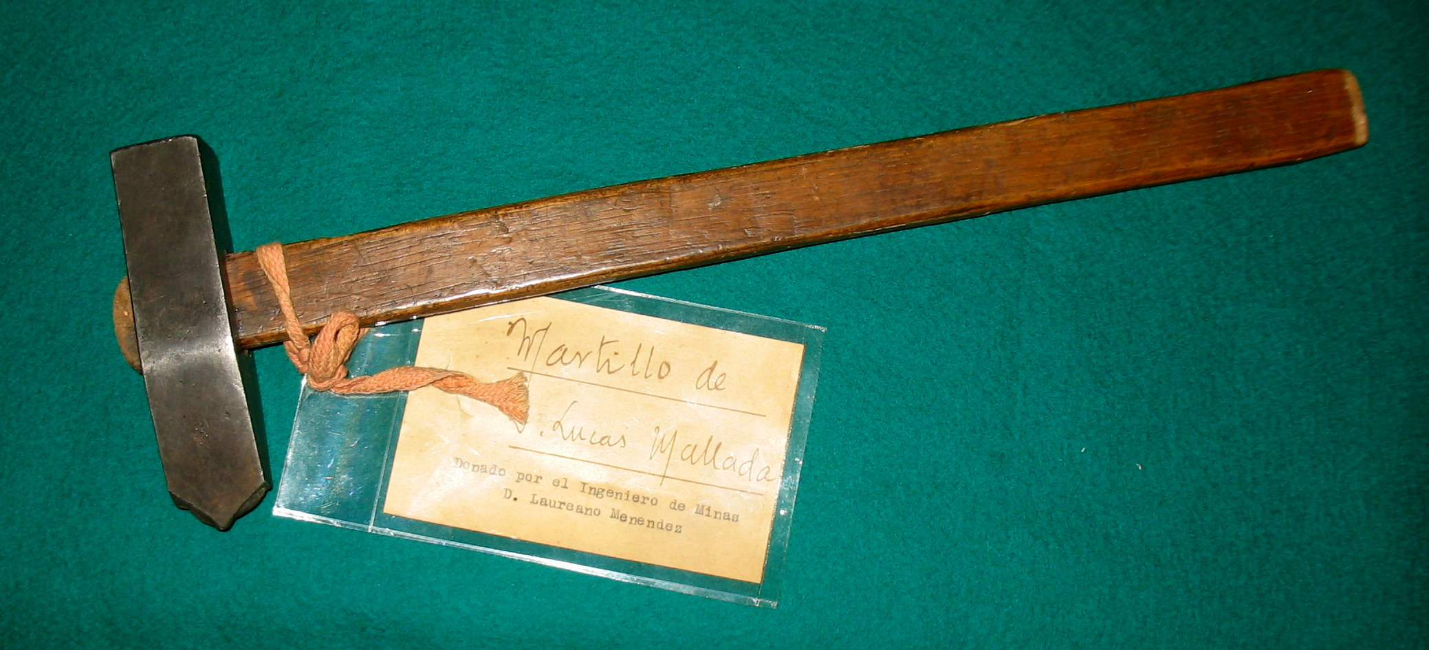 Martillo de geólogo de Lucas Mallada (1840-1921). Colección del Instituto Geológico y Minero de España (Madrid).